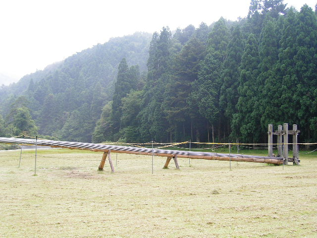 毎年8月14日に開催される京北伝統の火祭り・花脊松上げの会場（花脊交流の森の脇） 横たわる柱を立て、先端に籠を付け、松明を投入れる